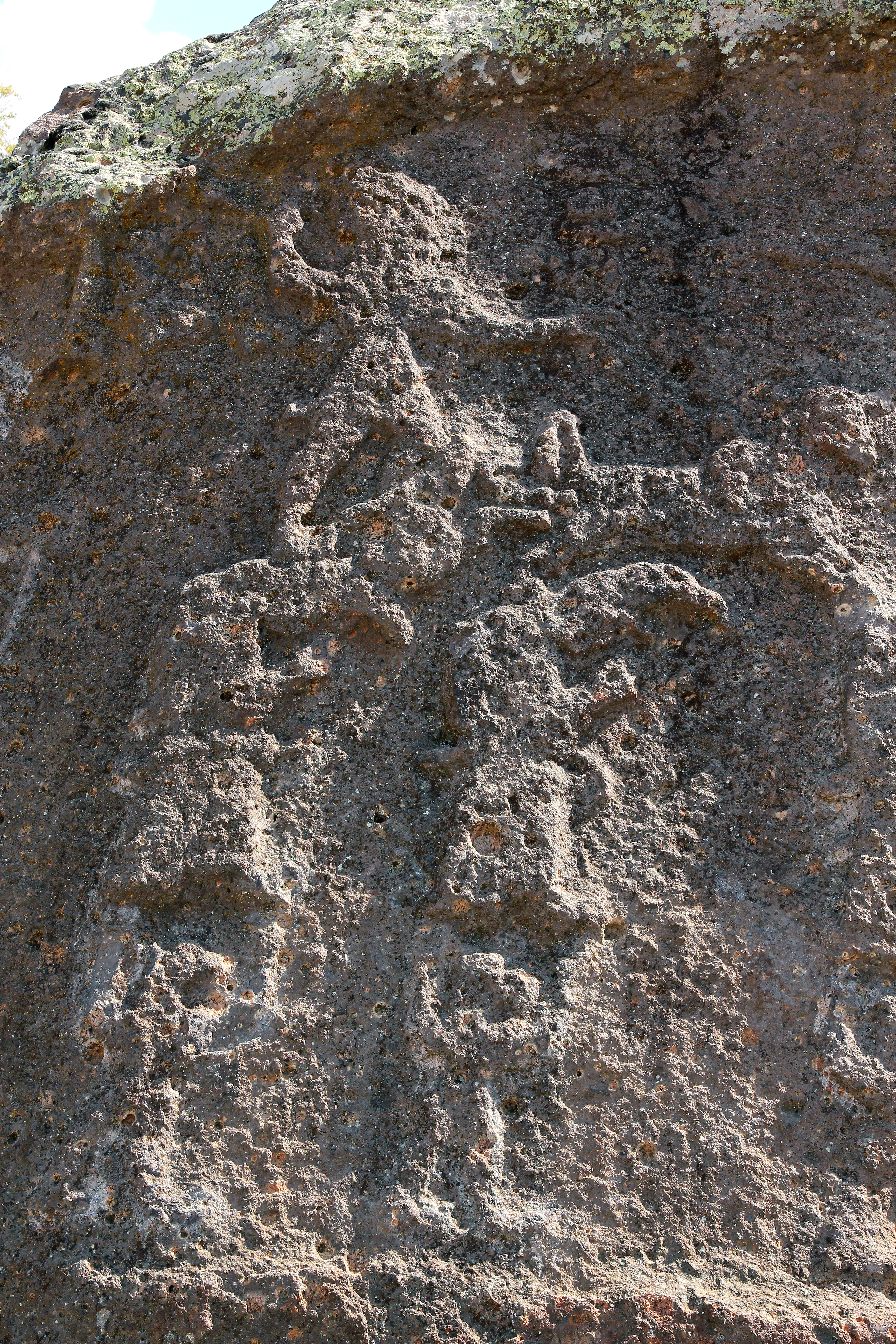 Hethitisches Felsrelief von İmamkullu (İmamkulu) bei Develi, Zentraltürkei - Wettergott mit Streitwagen und Zugtier, stehend auf Berggöttern, die auf Mischwesen stehen